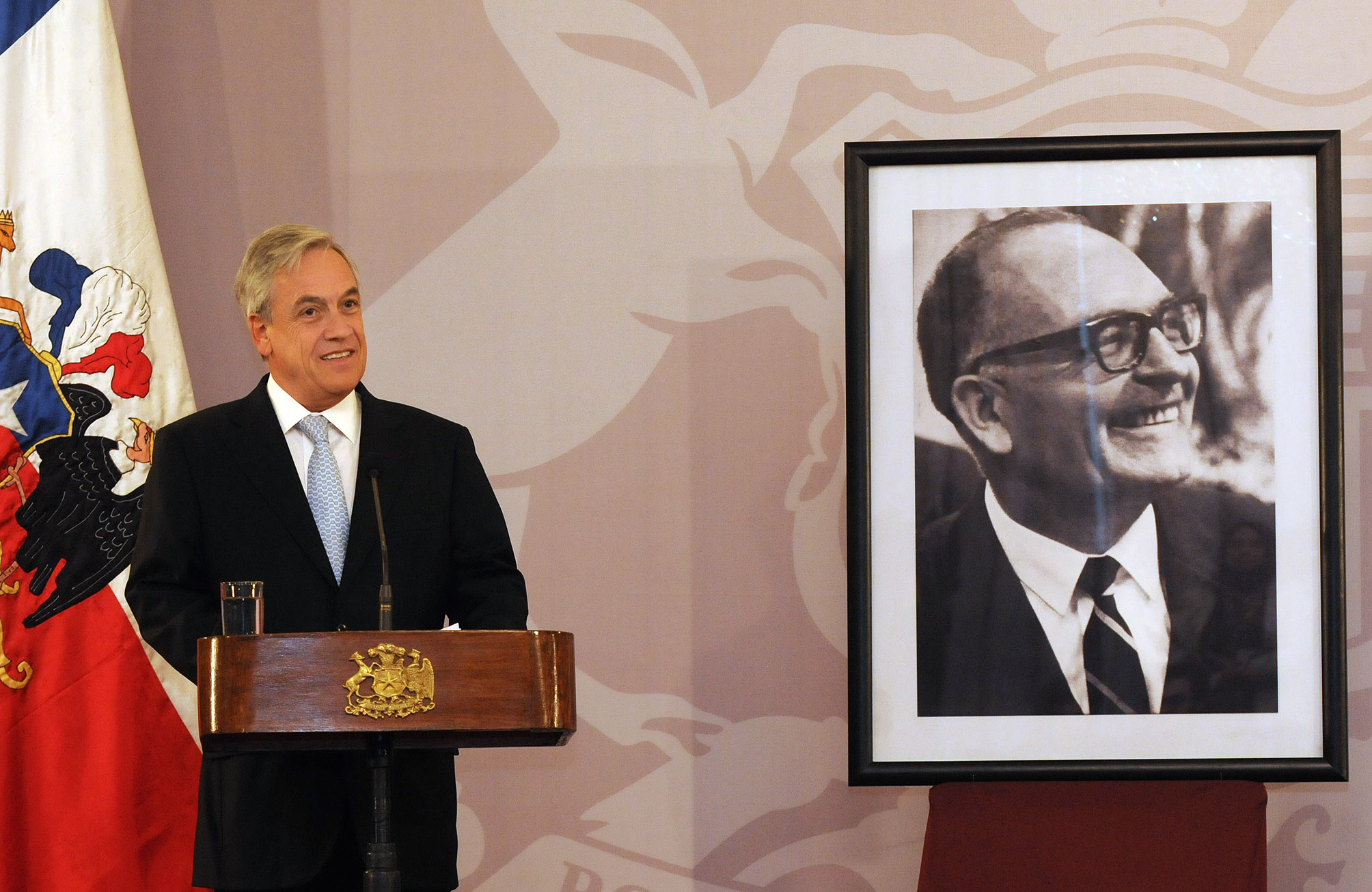 Homenaje a Edmundo Pérez Zujovic